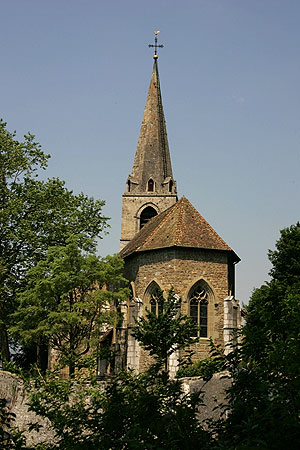 Saint-Vincent, Stadtkirche von Montreux (Les Planches)